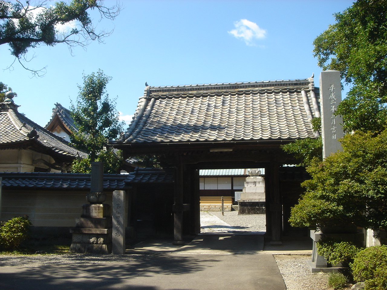 Zengakuin(Temple)(善学院),Godo,Gifu,Japan(岐阜県神戸町)で撮影